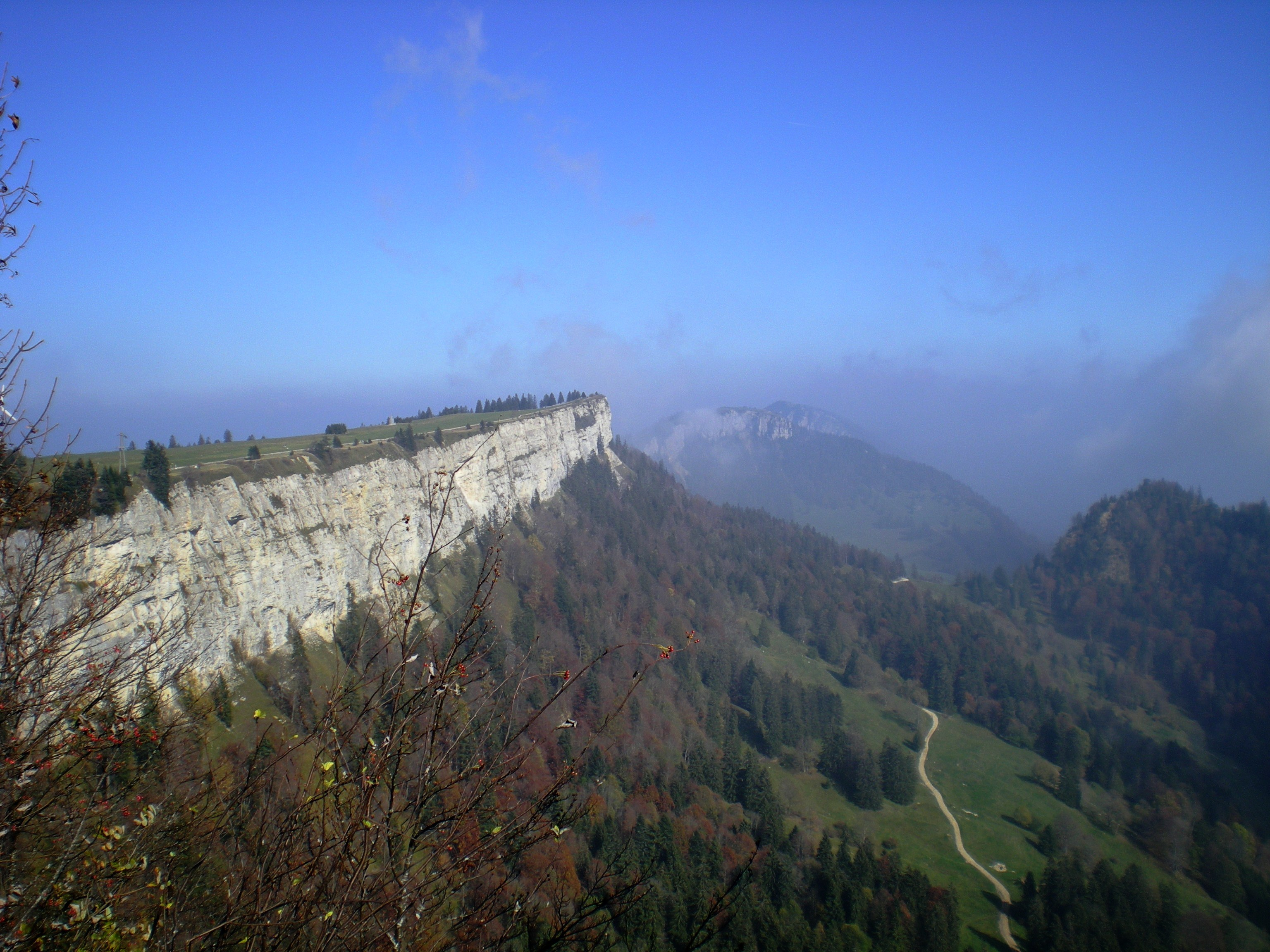 Stallfluh beim Obergrenchenberg schöne Wanderung Grenchenberg - Weissenstein